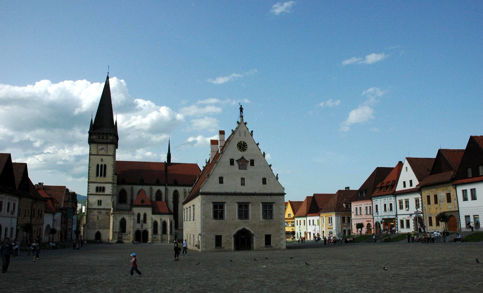 Radnica a Bazilika sv. Egídia, Bardejov